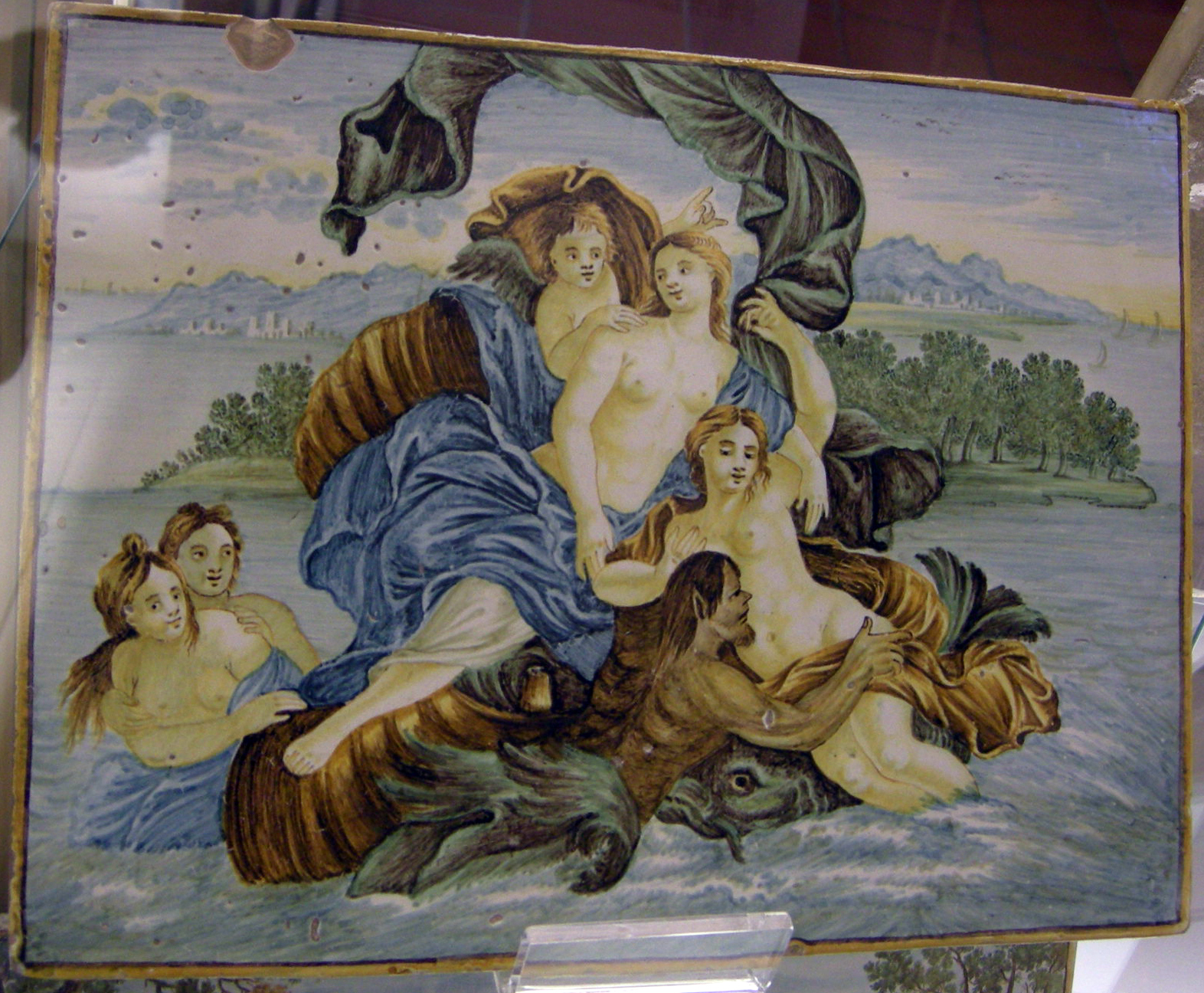 Palazzo Ducale di Urbino - Galleria Nazionale delle Marche - MIBAC This is a photo of a monument which is part of cultural heritage of Italy.